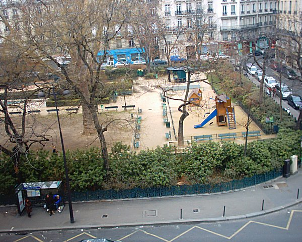 Square Montholon, IXeme arrondissement de Paris.